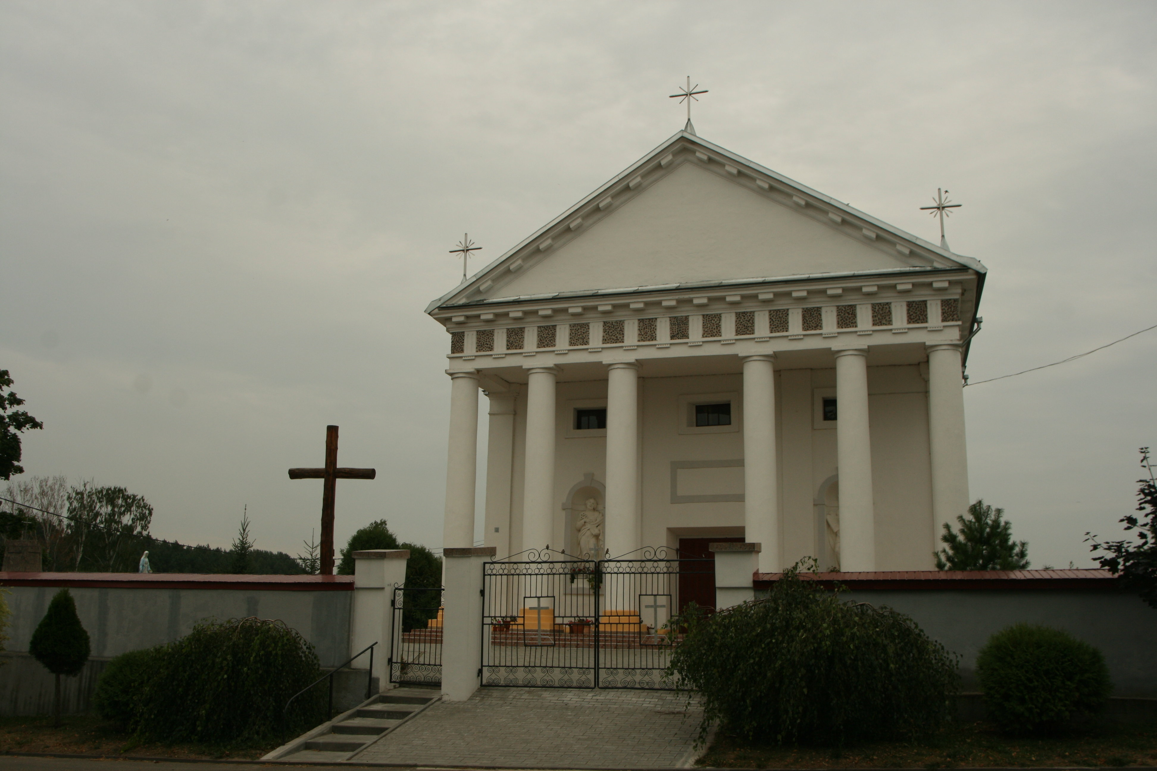 Viarejki, Belarus